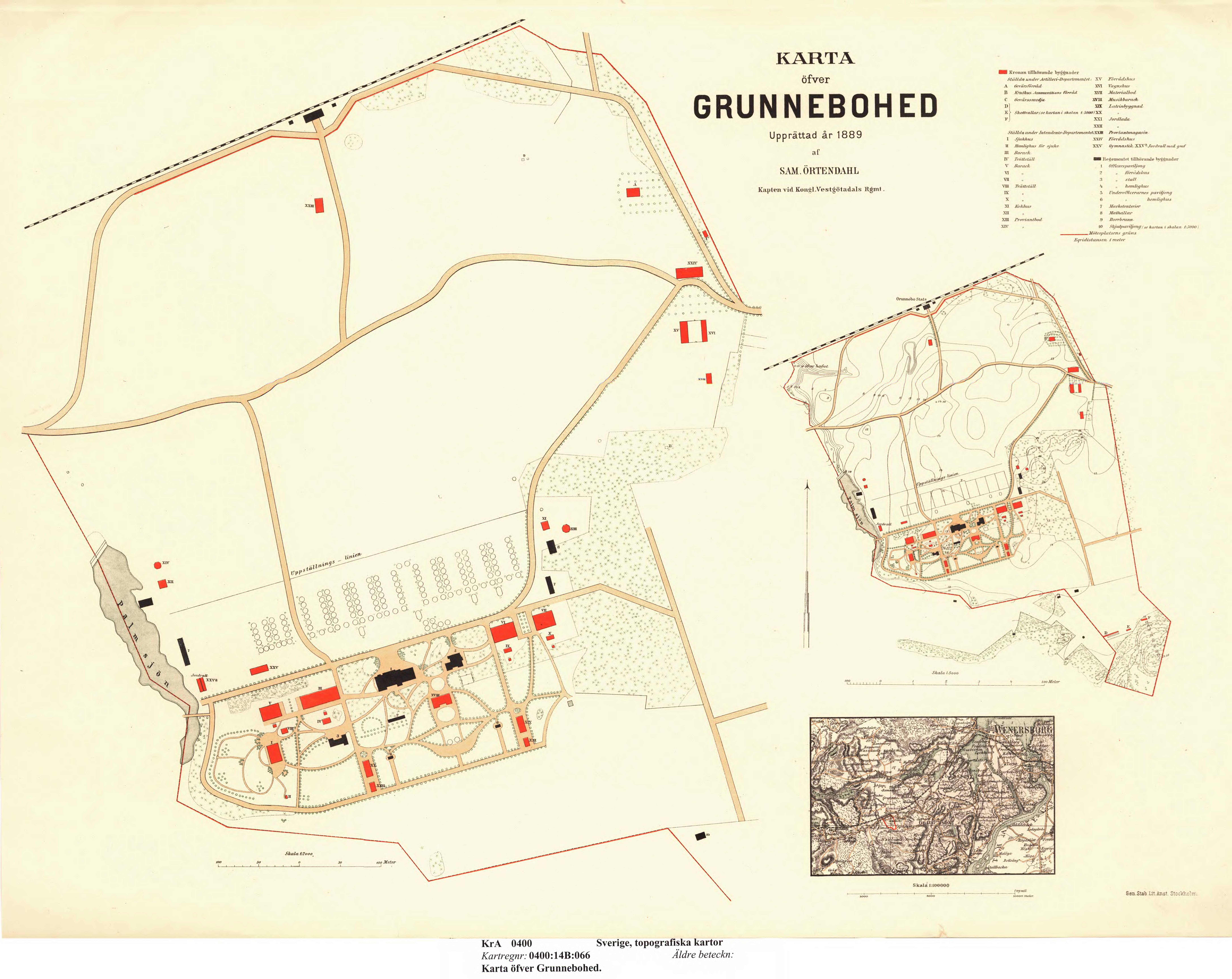 Karta över övningsområdet Grunnebohed väster om Vänersborg. Området användes av Västgöta-Dals regemente år 1863-1906, och i samband med andra världskriget men då huvudsakligen som flyktingförläggning.